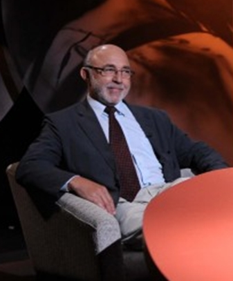 João Batista de Andrade (Ituiutaba, 1 de dezembro, 1939) é um diretor e produtor de cinema e televisão, roteirista e escritor brasileiro.